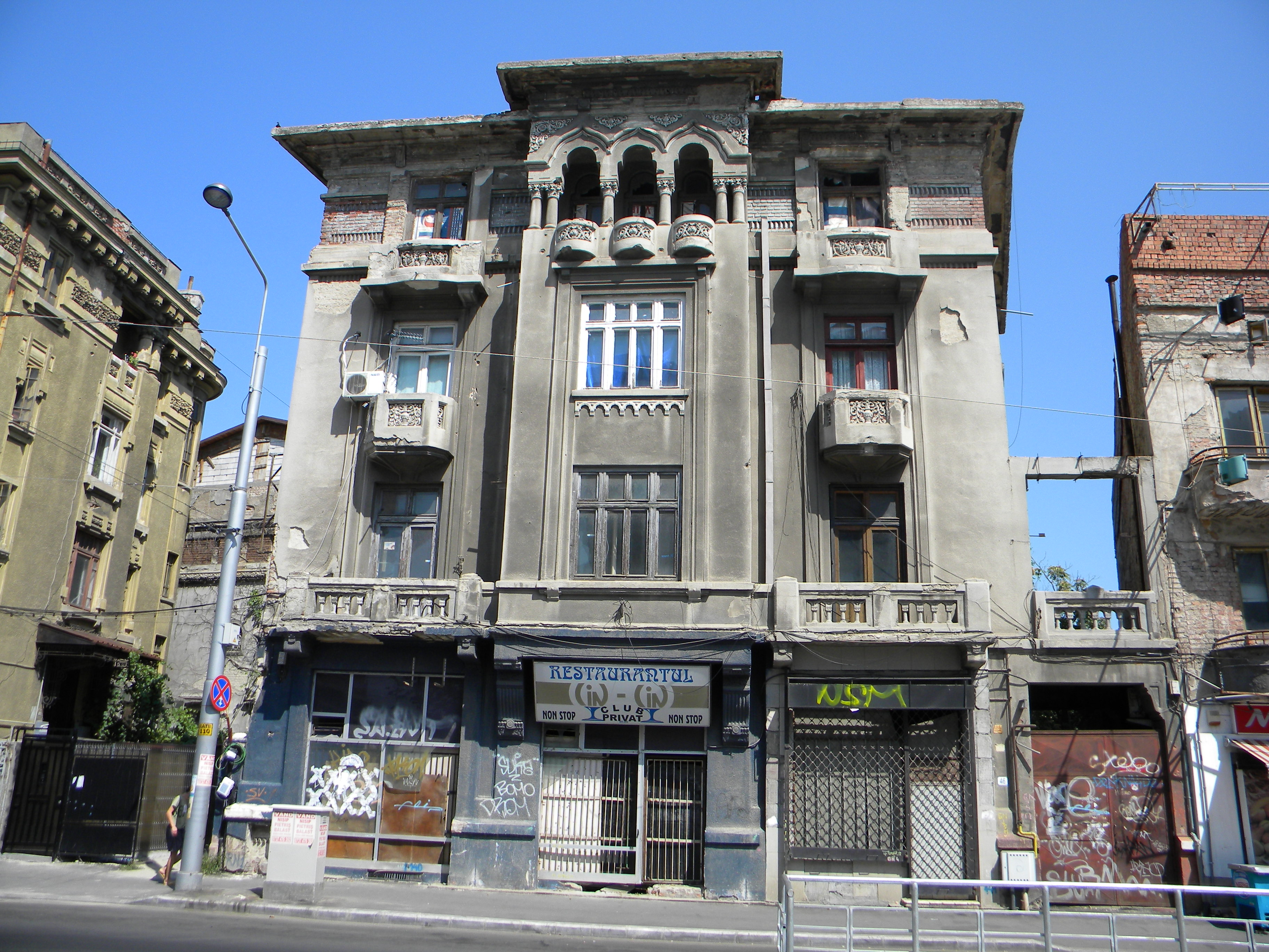 Casa pe Str. Berzei nr. 46, Bucuresti, sect. 1.JPG